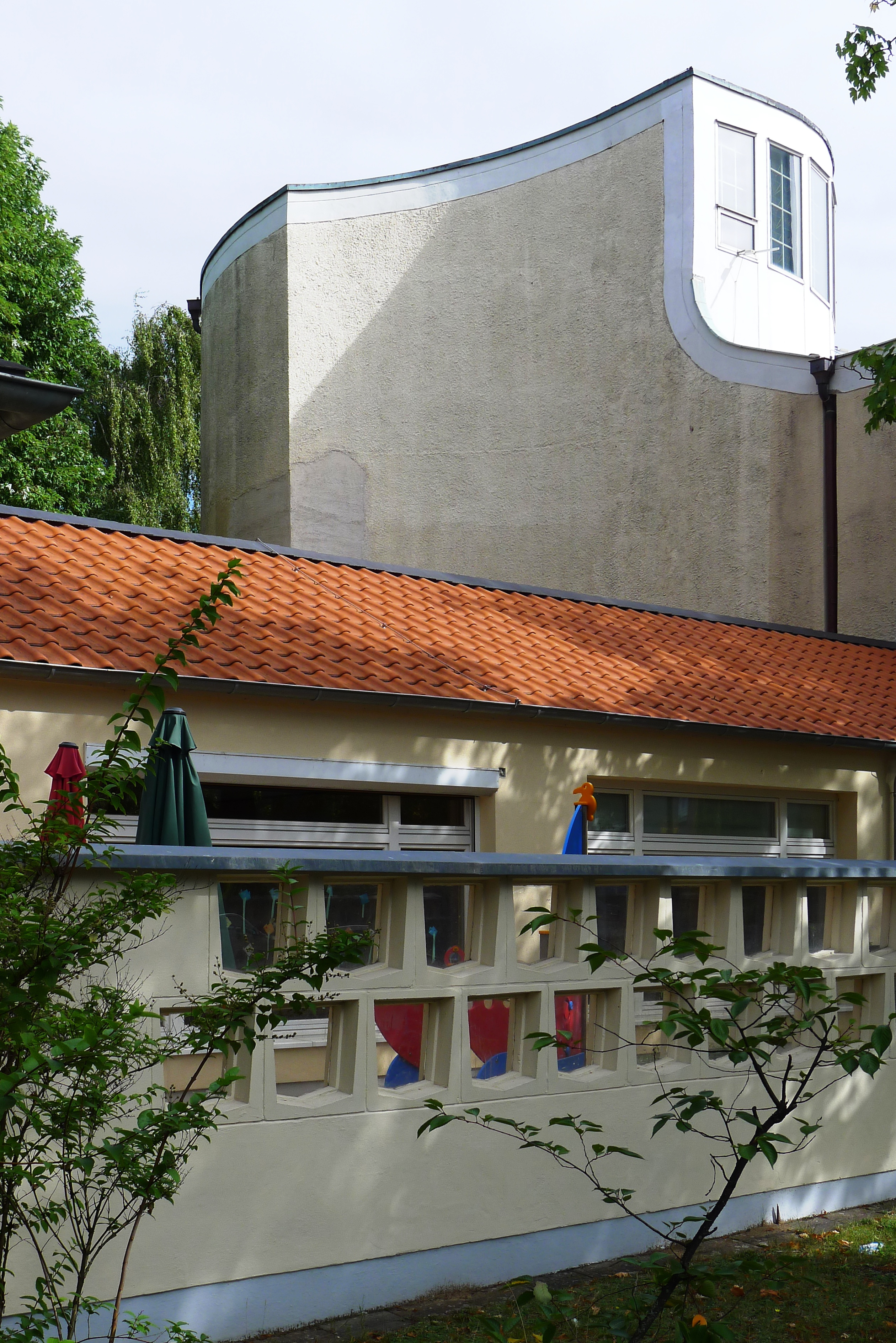 Den seitlichen Anbau für den Kindergarten überragt der Chor der Kirche.